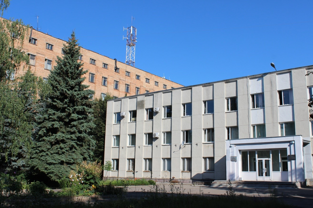 Фасад института